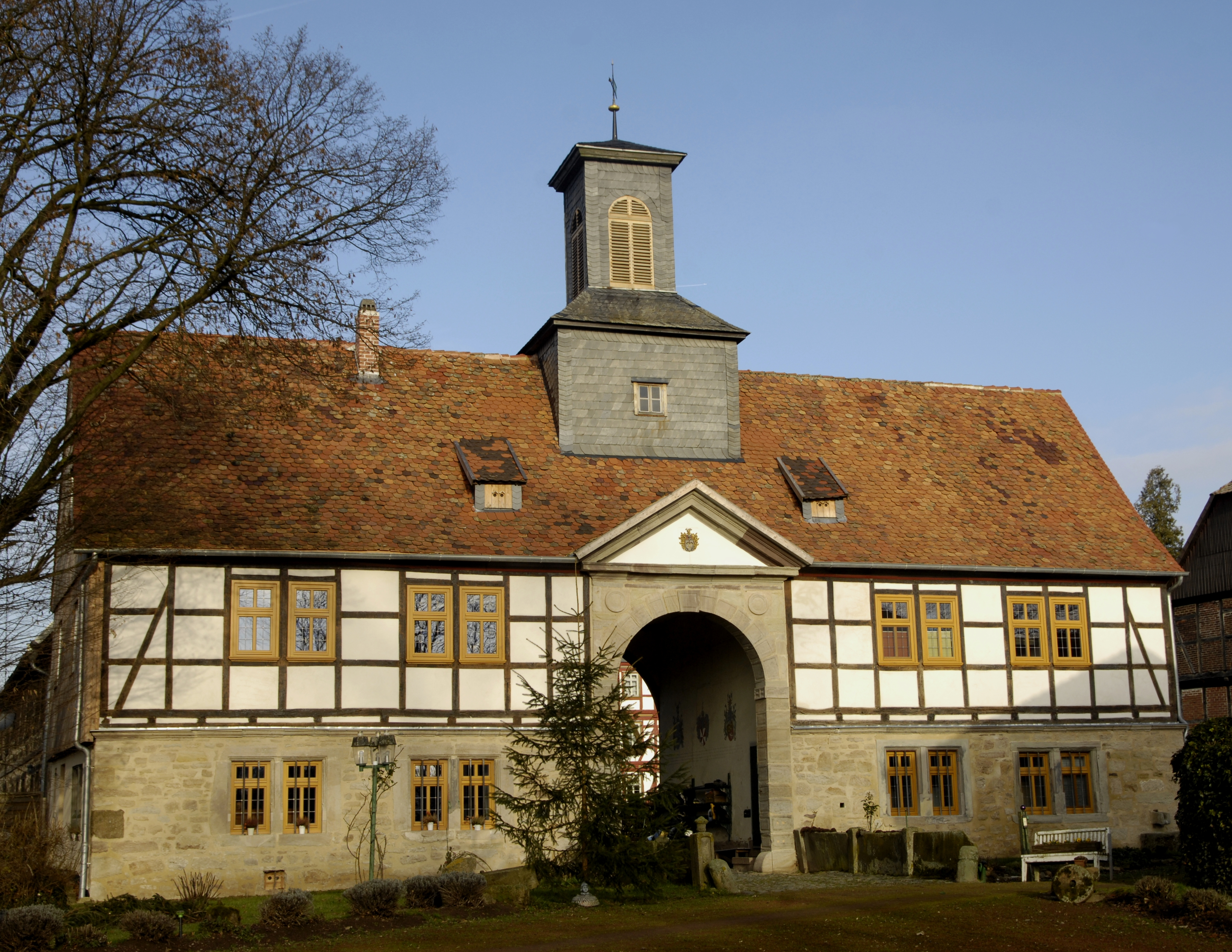 Gut Bodenhausen, Torhaus This is a photograph of an architectural monument.It is on the list of cultural monuments of Habichtswald